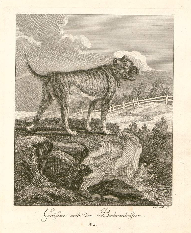 Darstellung eines Danziger Bären- bzw. Bullenbeißers. Bildunterschrift: "Größere arth der Baehrenbeißer. Nr. 2."